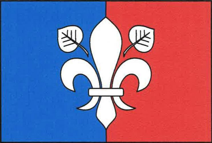 Pohled, okres Havlíčkův Brod, vlajka